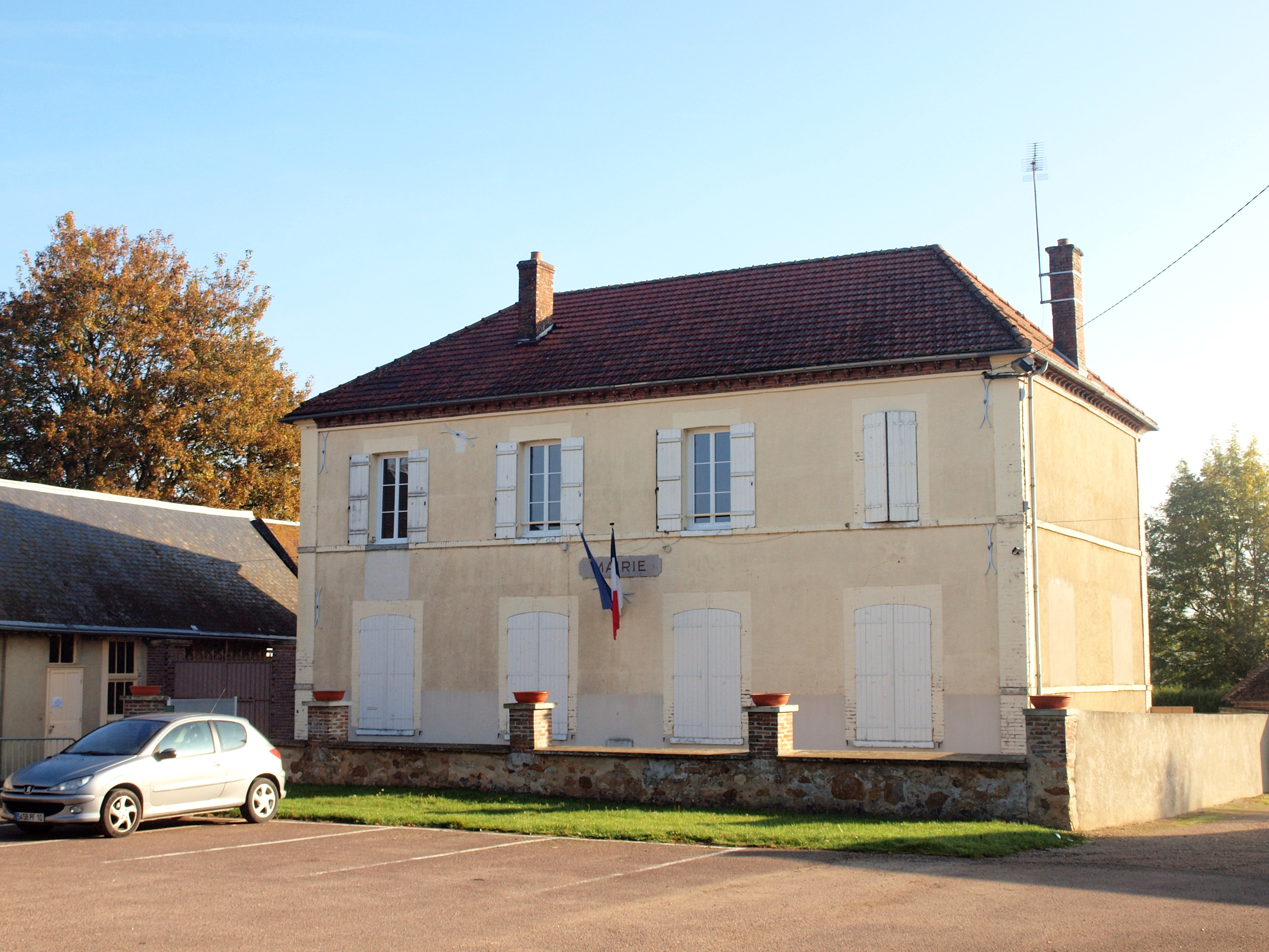 Saint-Maurice-aux-Riches-Hommes (Yonne, France)